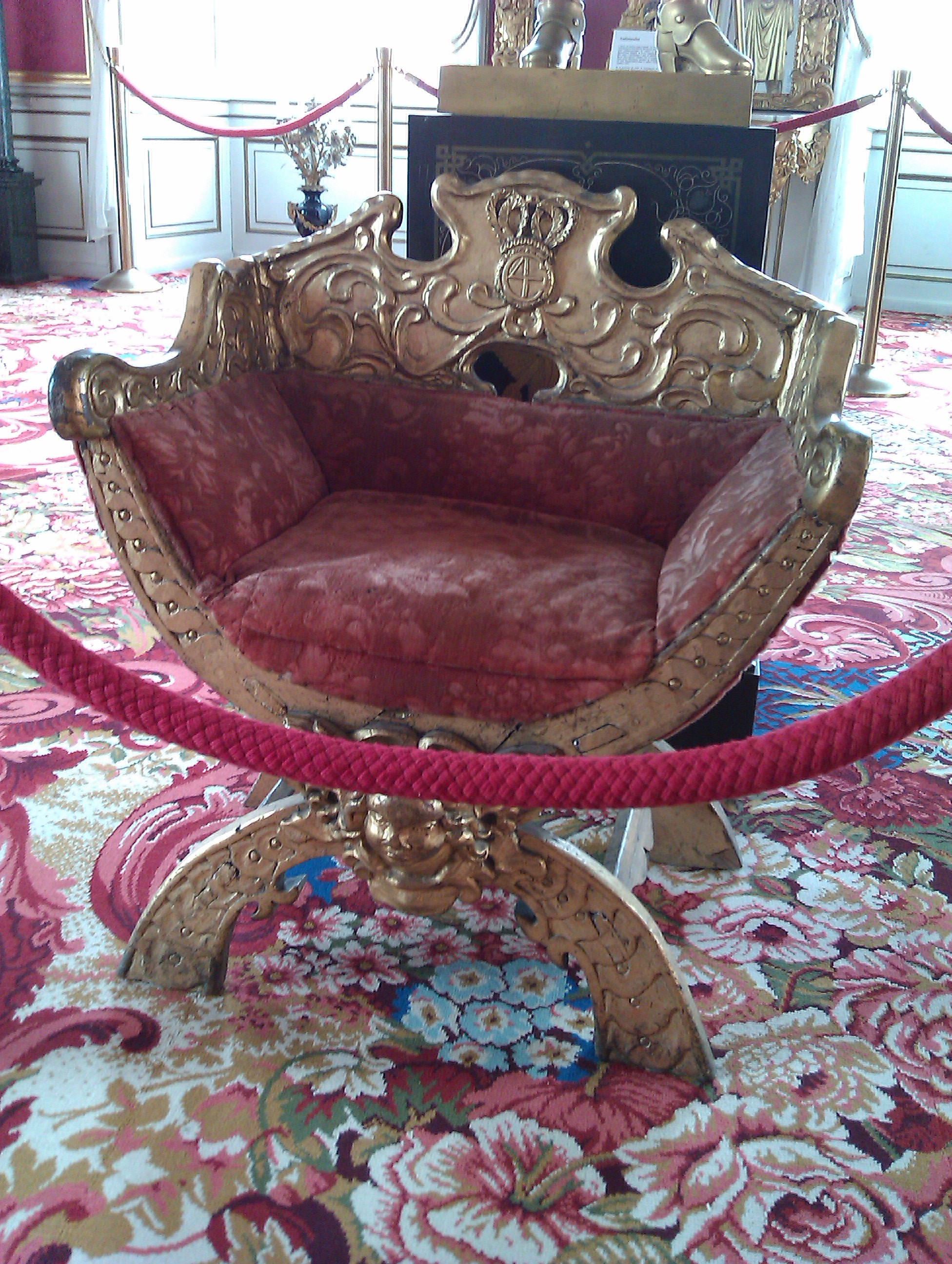 Tronstol fra Jægerspris Slot med kong Christian IVs monogram, Jægerspris, Sjælland